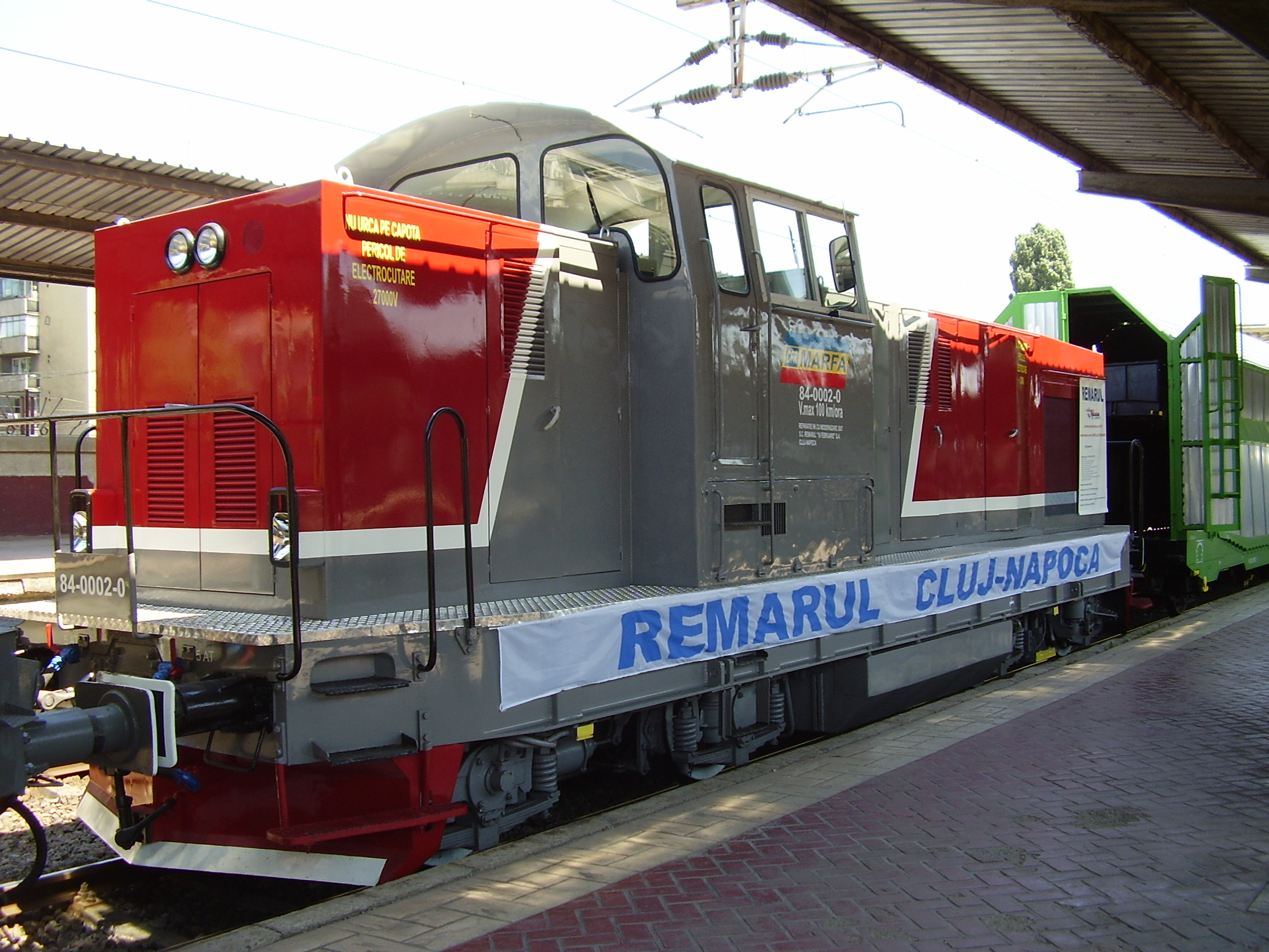 84-0002-0 în gara Bucureşti Nord. Foto: Dr2005